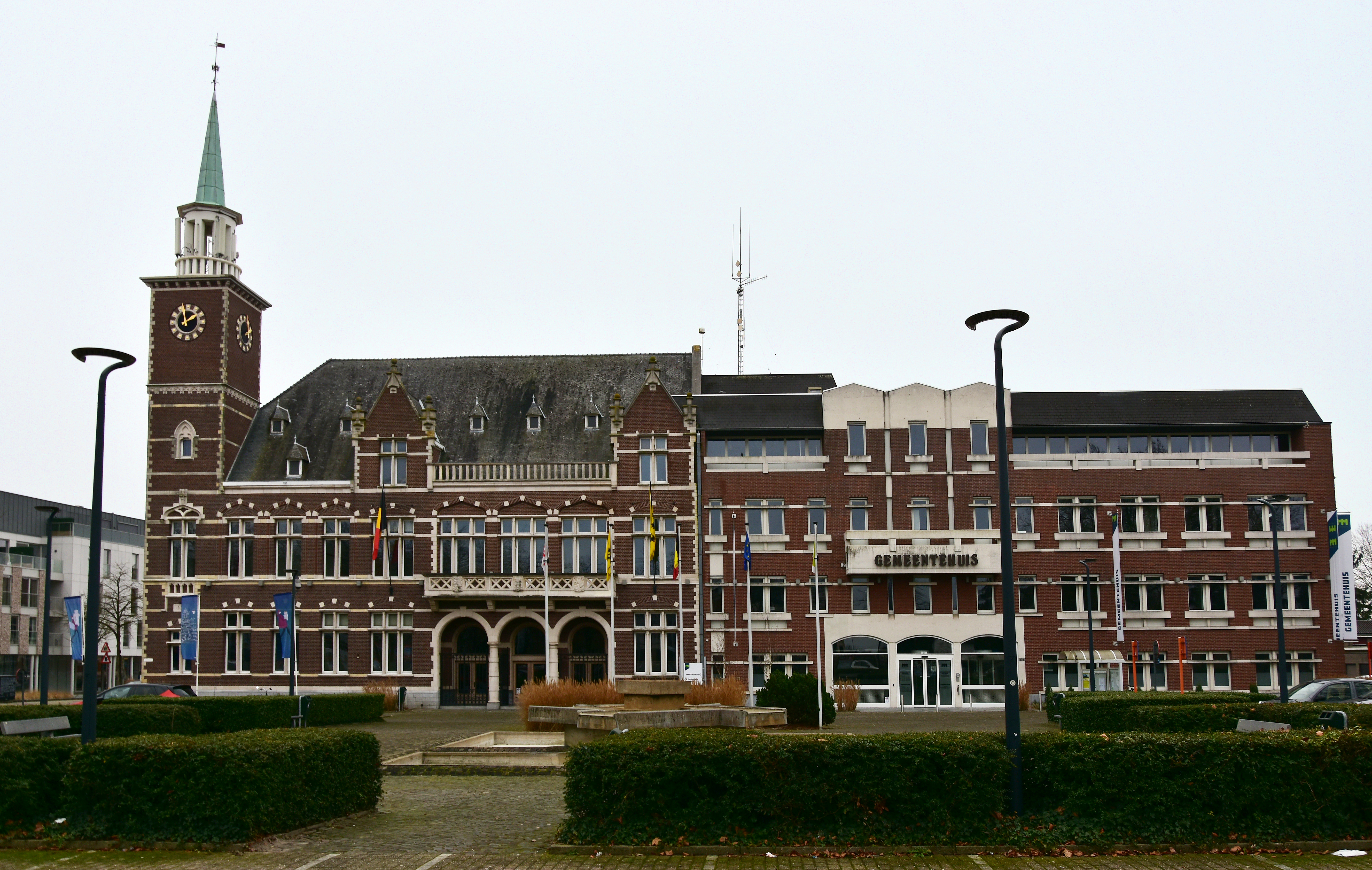 Maasmechelen gemeentehuis (1101) 25-01-2020 13-58-49